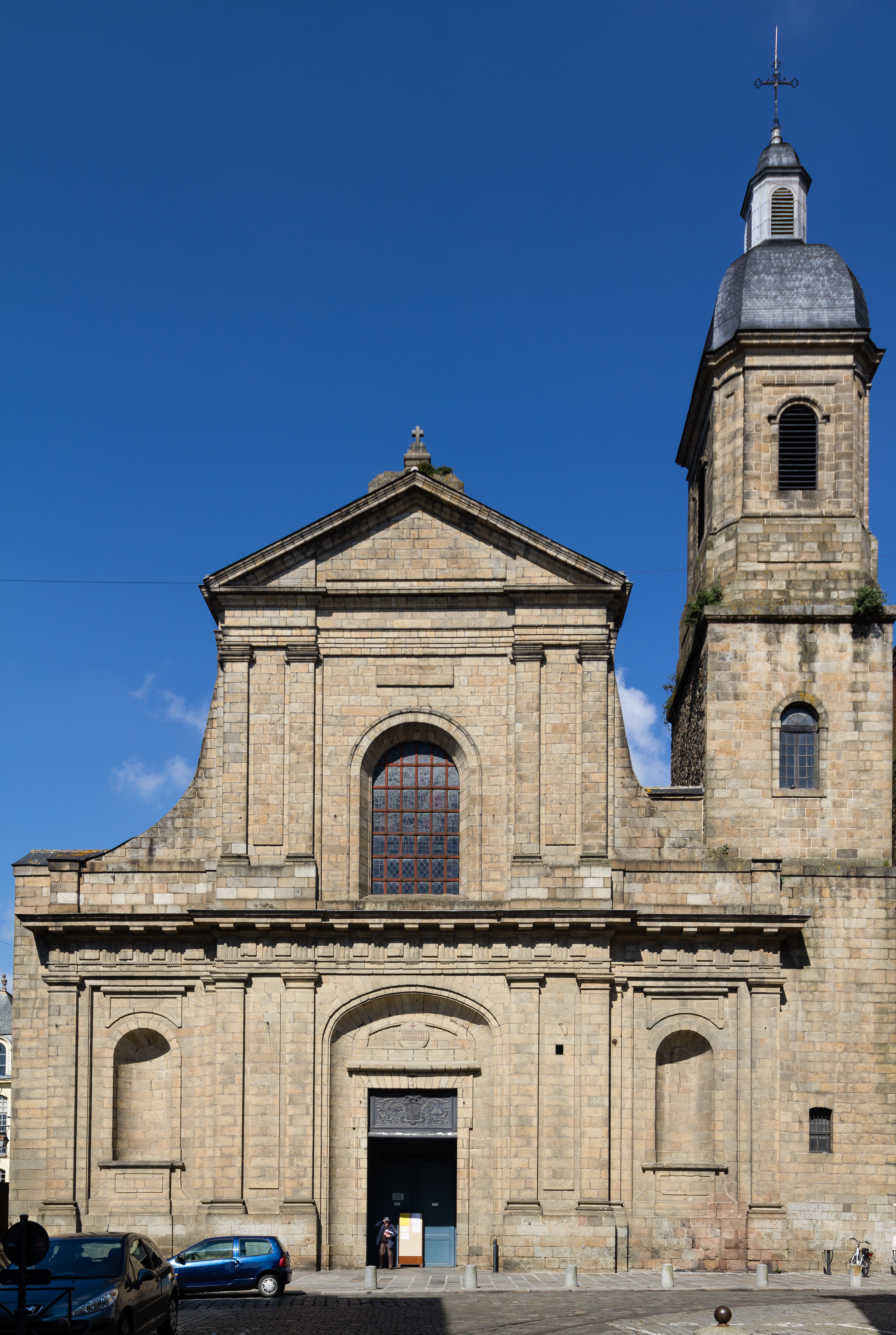 Façade de la basilique Saint-Sauveur de Rennes (France).